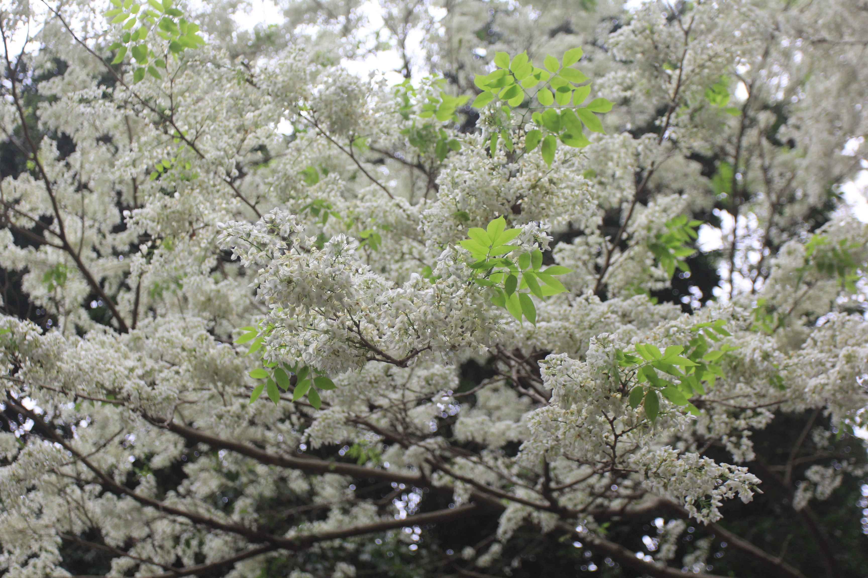 Hoa sưa mang một vẻ đẹp dịu dàng tinh khôi, thường nở vào tháng ba hàng năm.